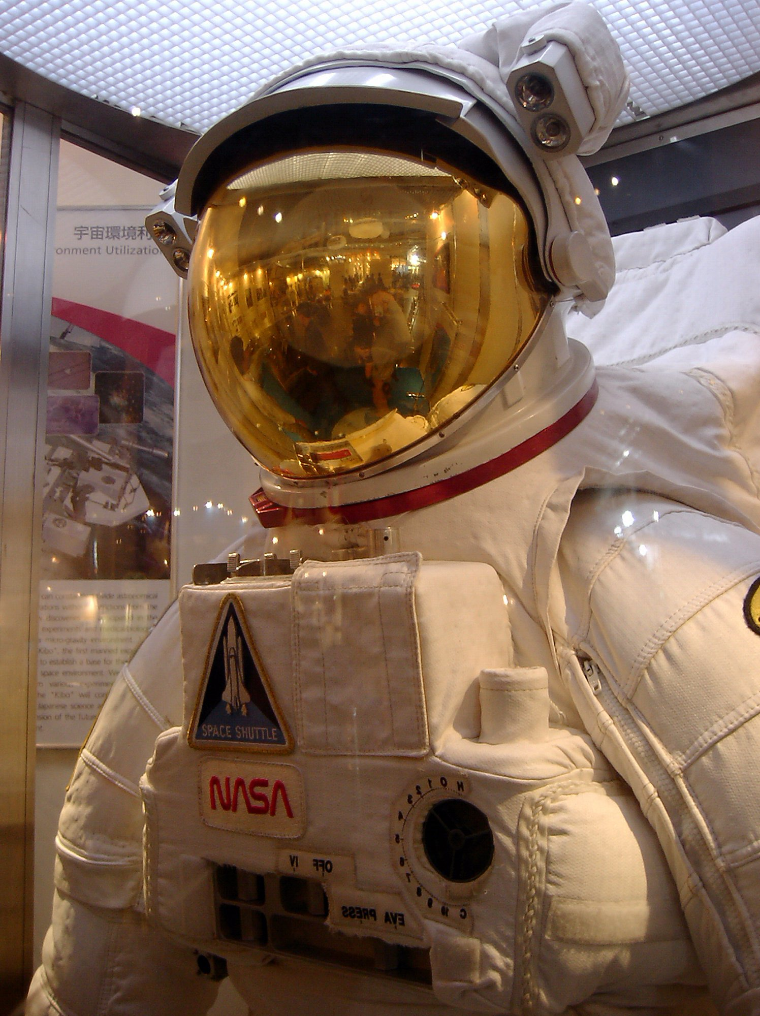 Extravehicular Mobility Unit Replica. 船外活動用宇宙服 2005年1月に開催された神戸テクノフェアのNASDAの展示物 Copyright OpenCage